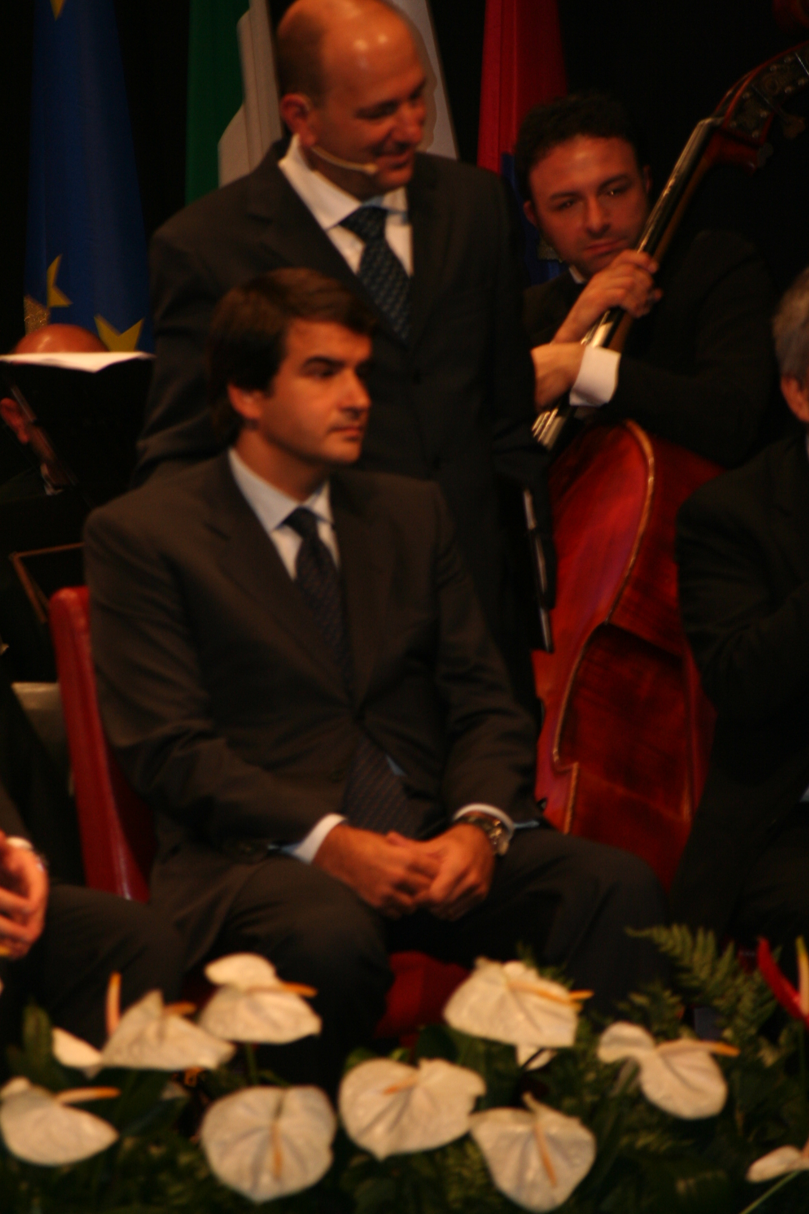 inaugurazione del teatro di Canosa di Puglia - 5-11-11